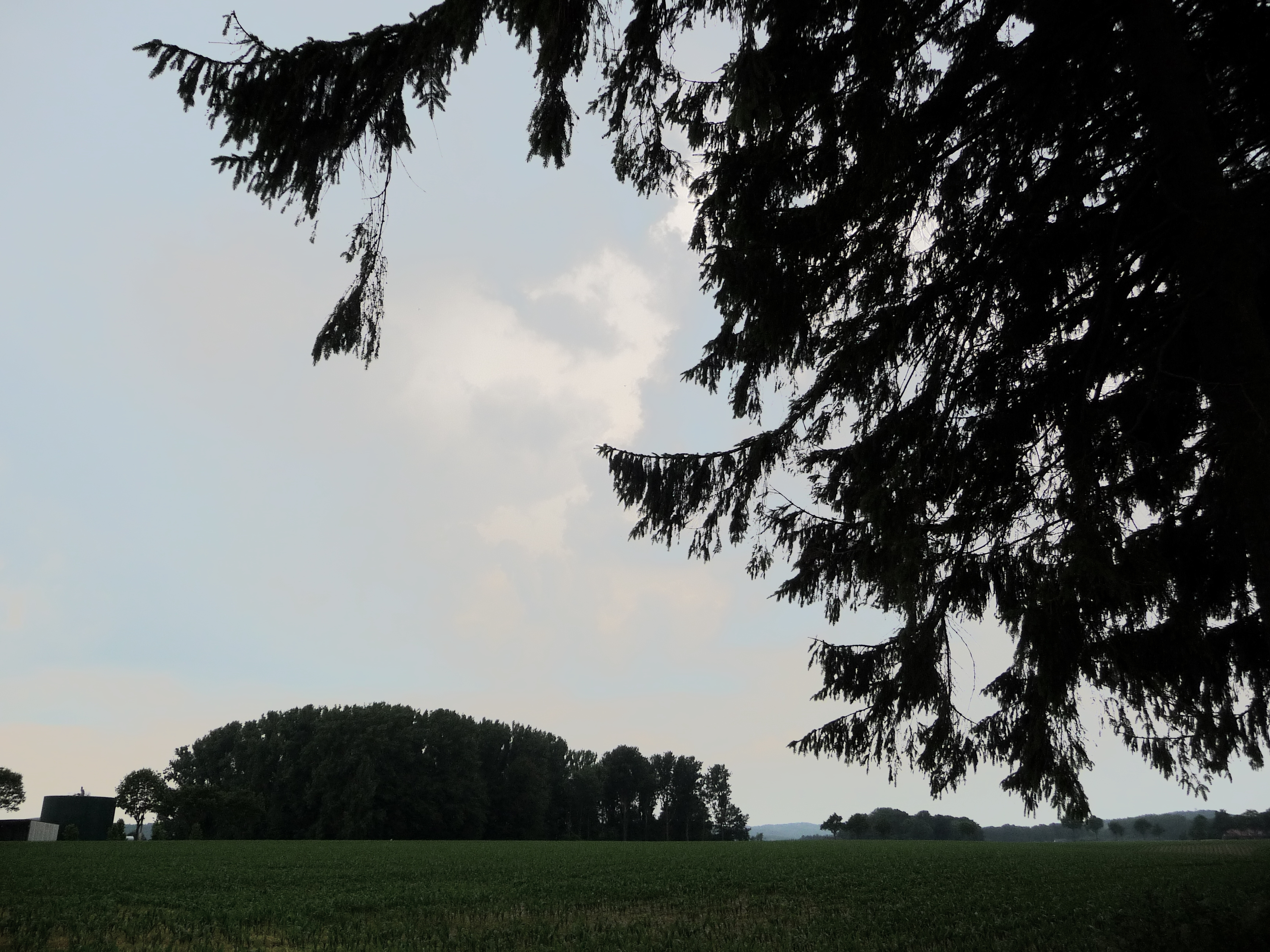 Ein kleines nahezu urwüchsiges Waldgebiet nahe bei Melle. Man findet hier zwei Hochstände, Wiesen, einen kleinen Bach, aber auch viel Holzschlag.